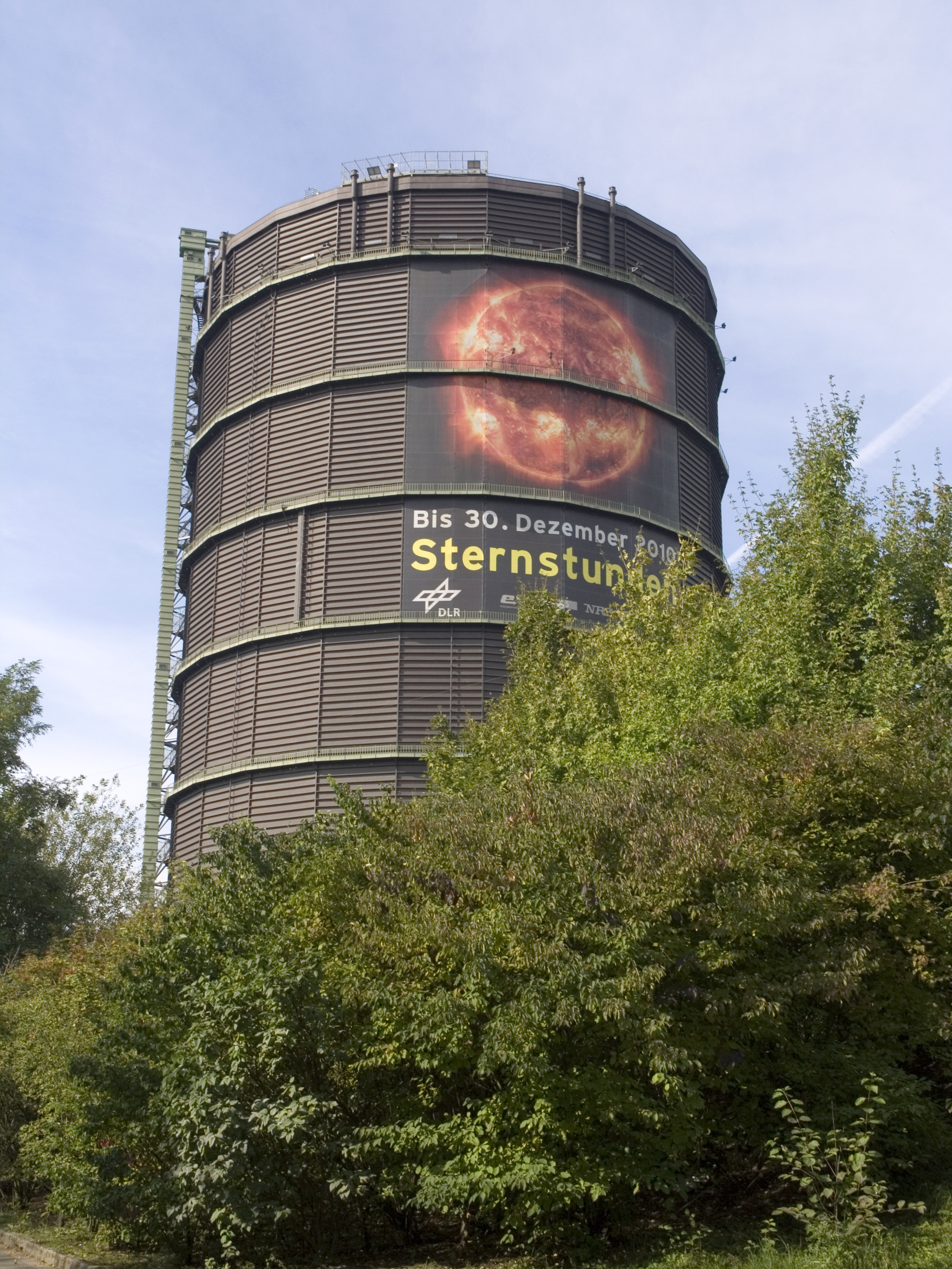 Газометр в Оберхаузене (Северный Рейн-Вестфалия)